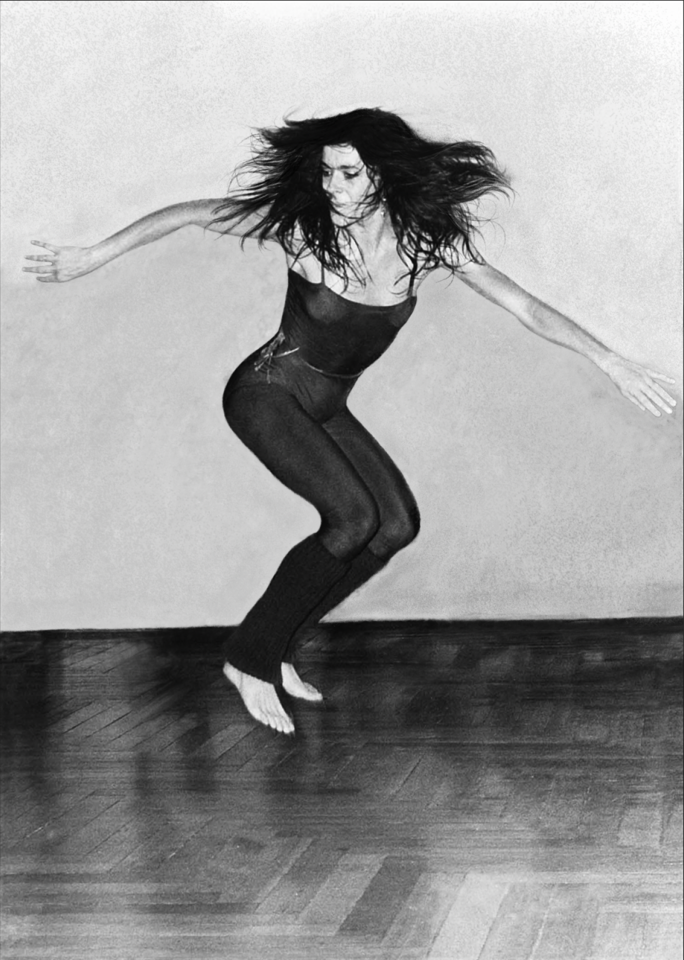 Jeanine en action